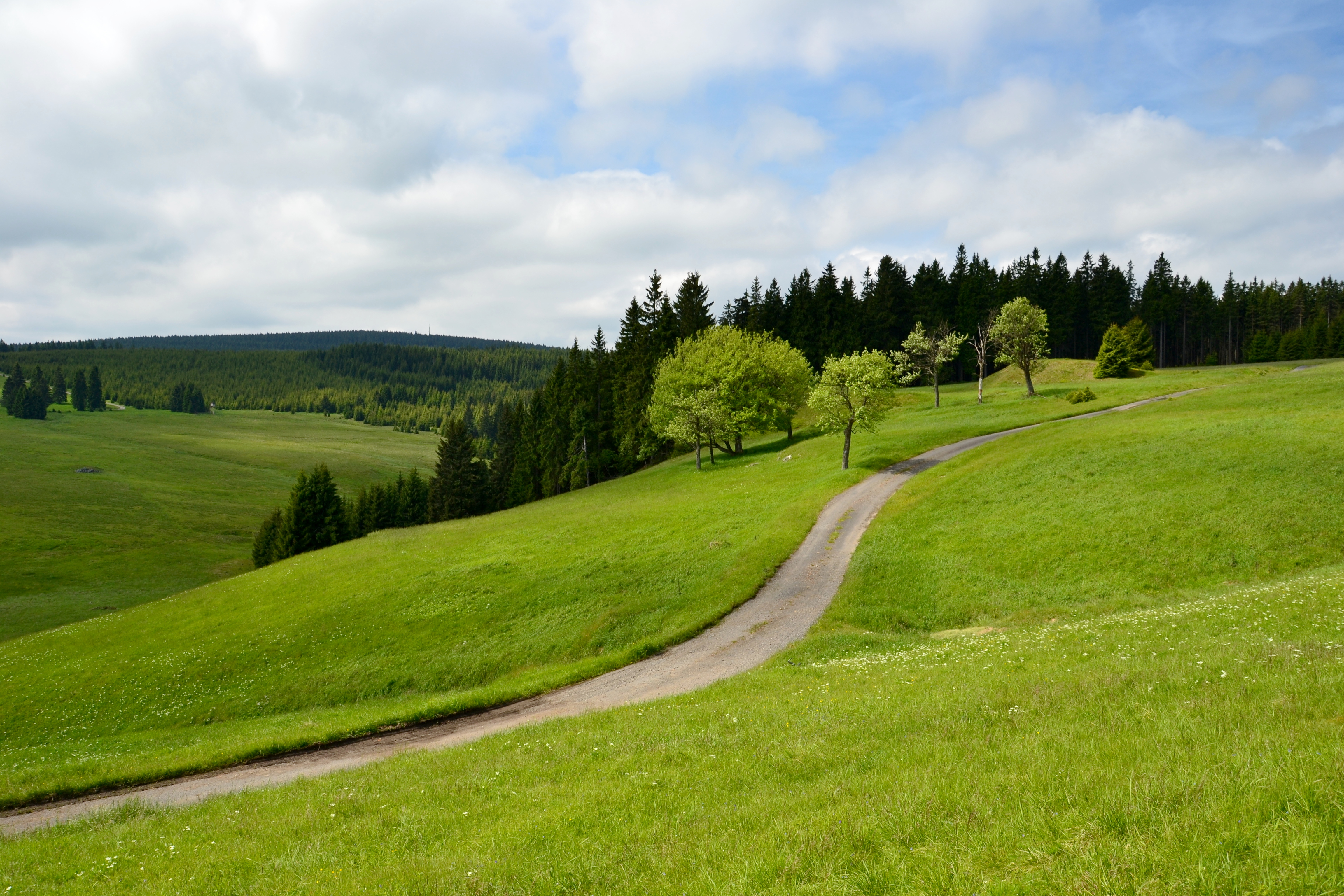 Místo, kde stávala vesnice Háje